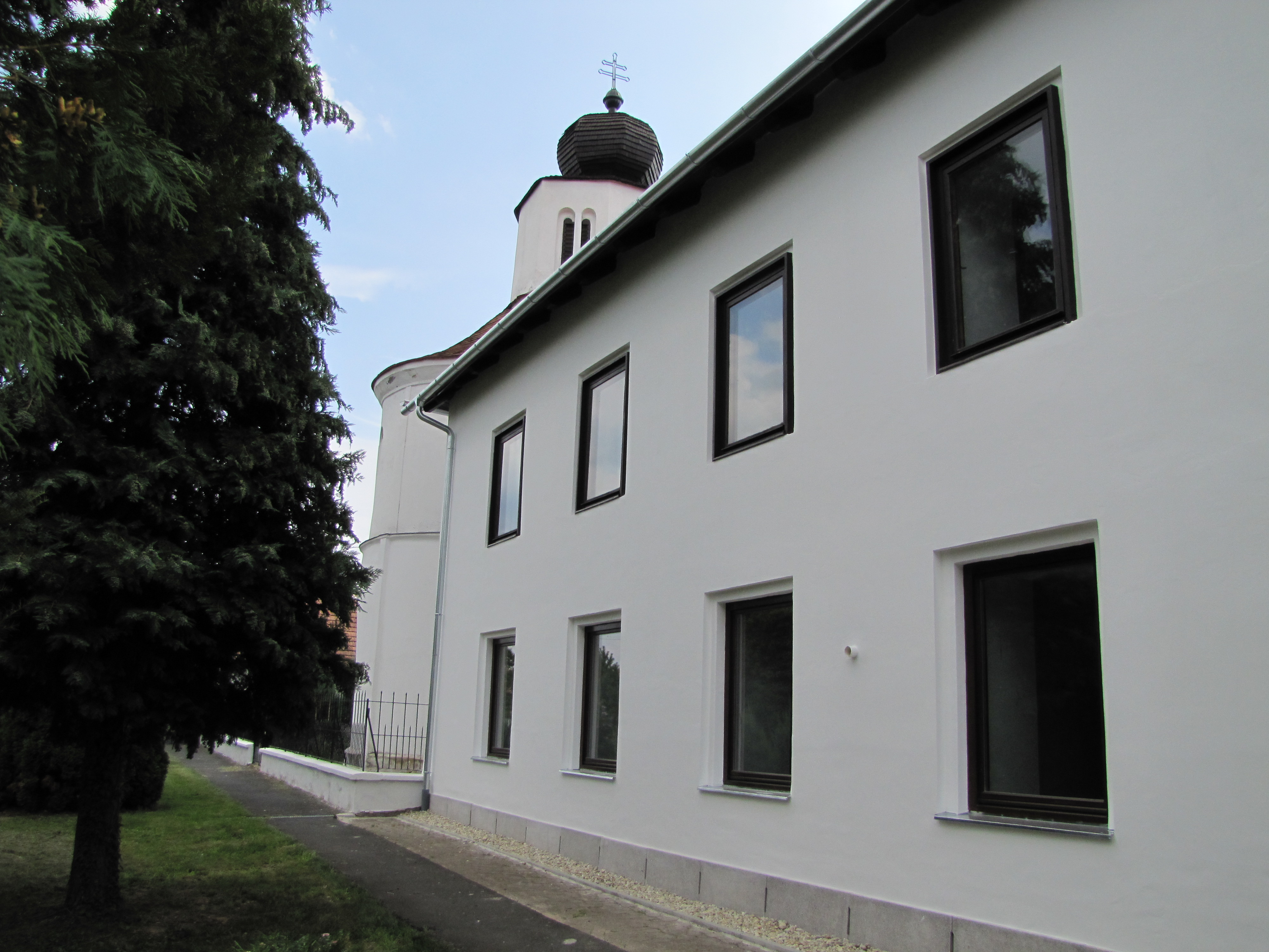 A kápolnára ráépített kolostorépület részlete (Pápoc)